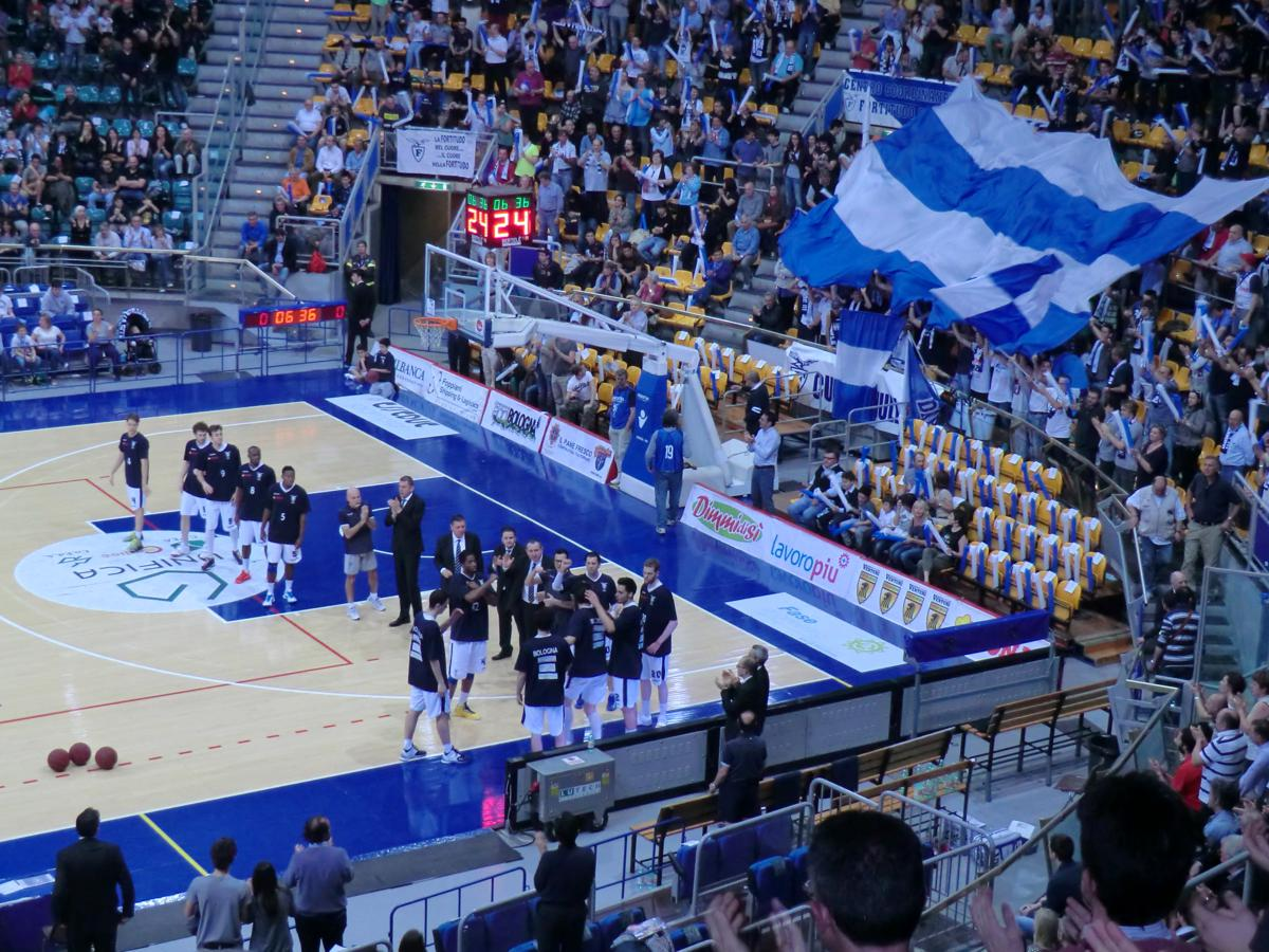 Alcune immagini scattate in occasione dell'incontro di LegaDue tra Bologna e Forlì al PalaDozza di Bologna.